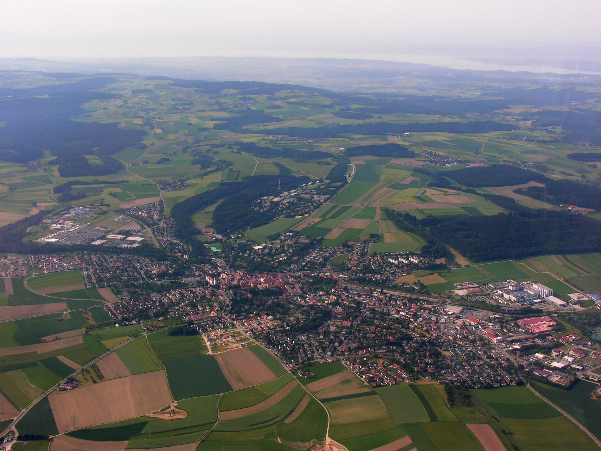 Germany, Baden-Württemberg, Aerial view of Pfullendorf